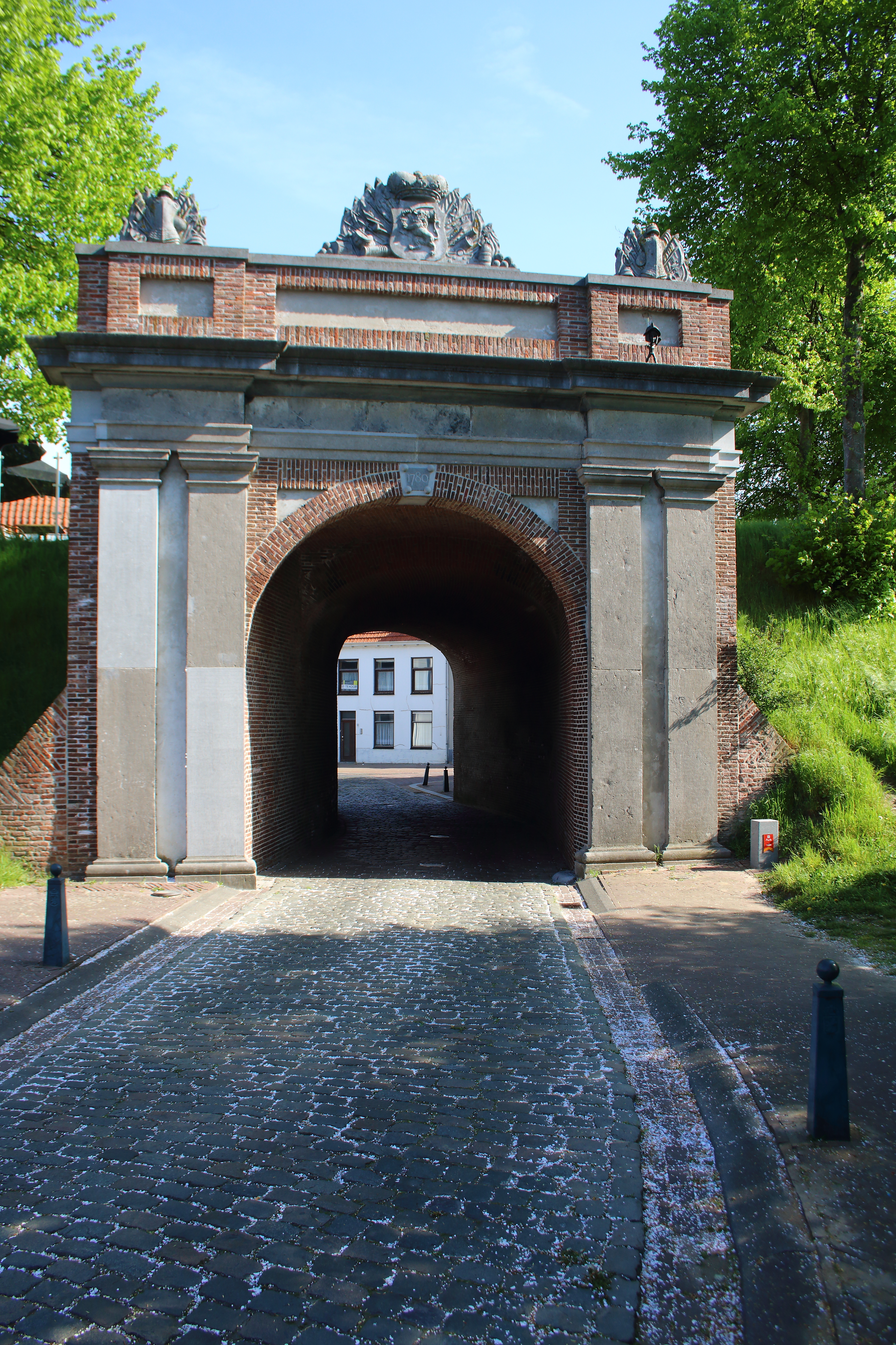 Gentsepoort, Hulst, Zeeuws-Vlaanderen, Zeeland, Nederland